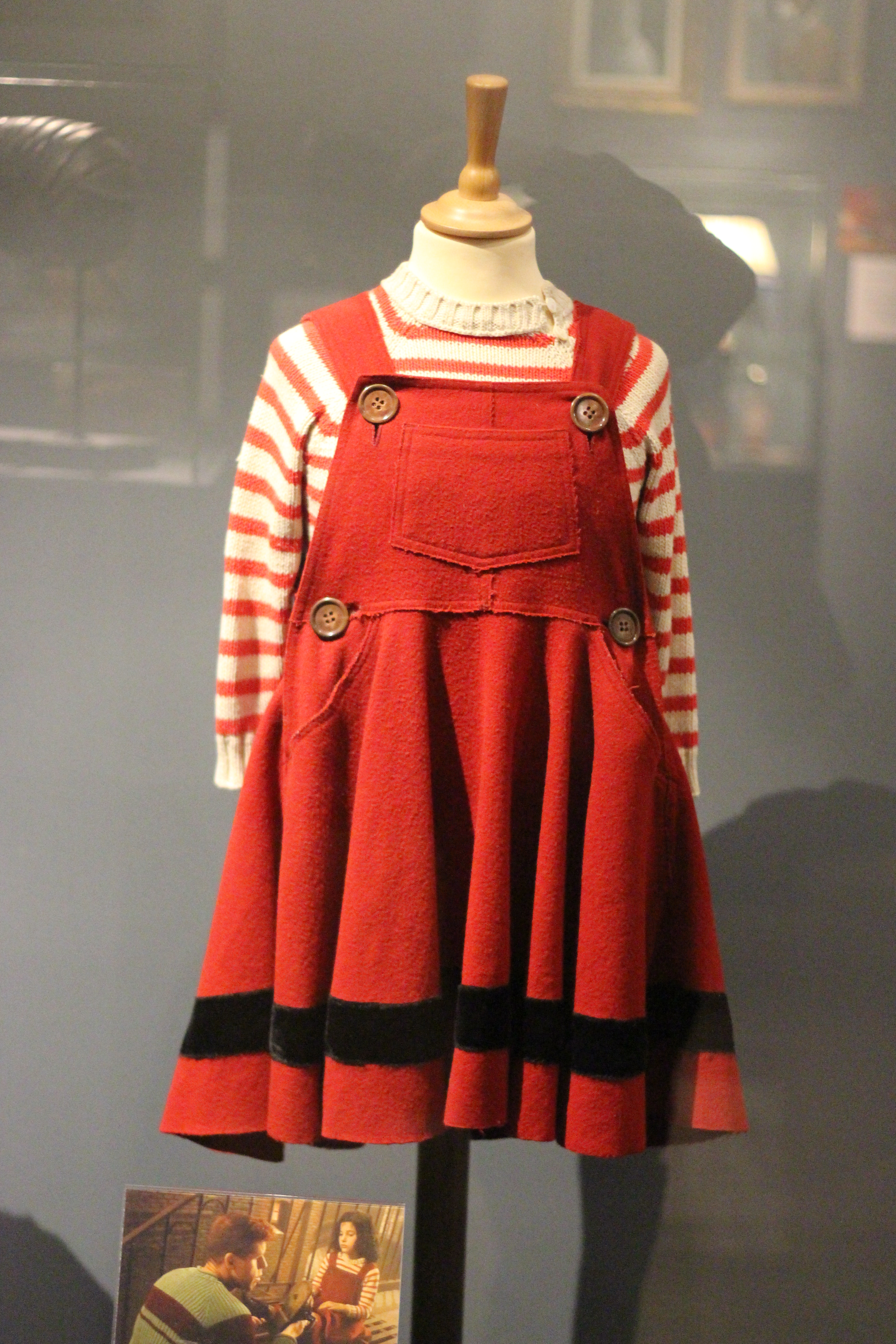 Costume de Miette (jouée par Judith Vittet) dans le film La Cité des enfants perdus (costume créé par Jean-Paul Gaultier). Exposition "Caro/Jeunet" au musée Minature et Cinéma en 2018-2019.